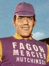 Jean-Pierre Genet (1971), 'Sprint 71', Panini figurina n°90.